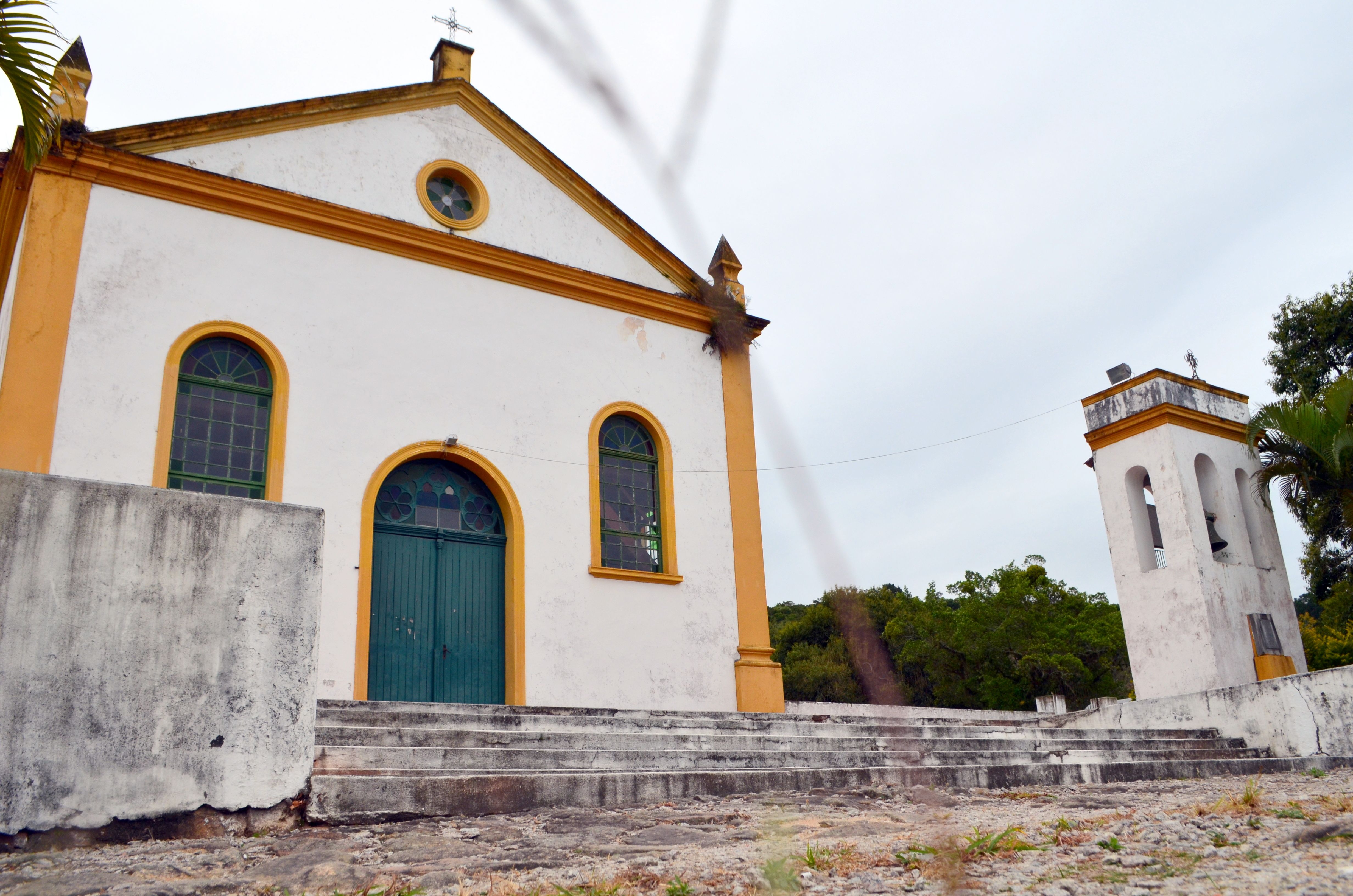 Vila de São Miguel: conjunto arquitetônico e paisagístico: Igreja, Aqueduto, Carioca